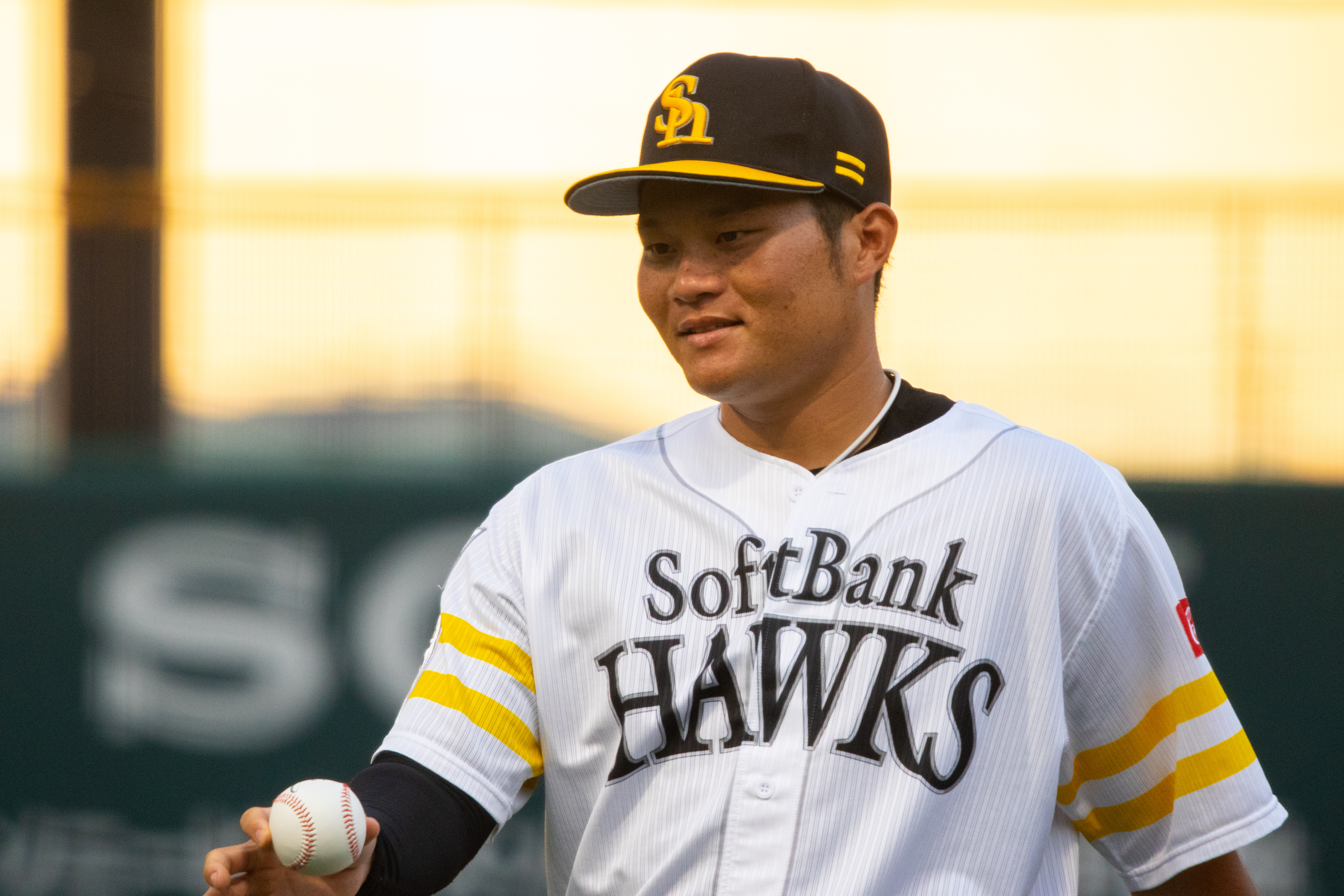 2018/8/10 ウエスタン・リーグ